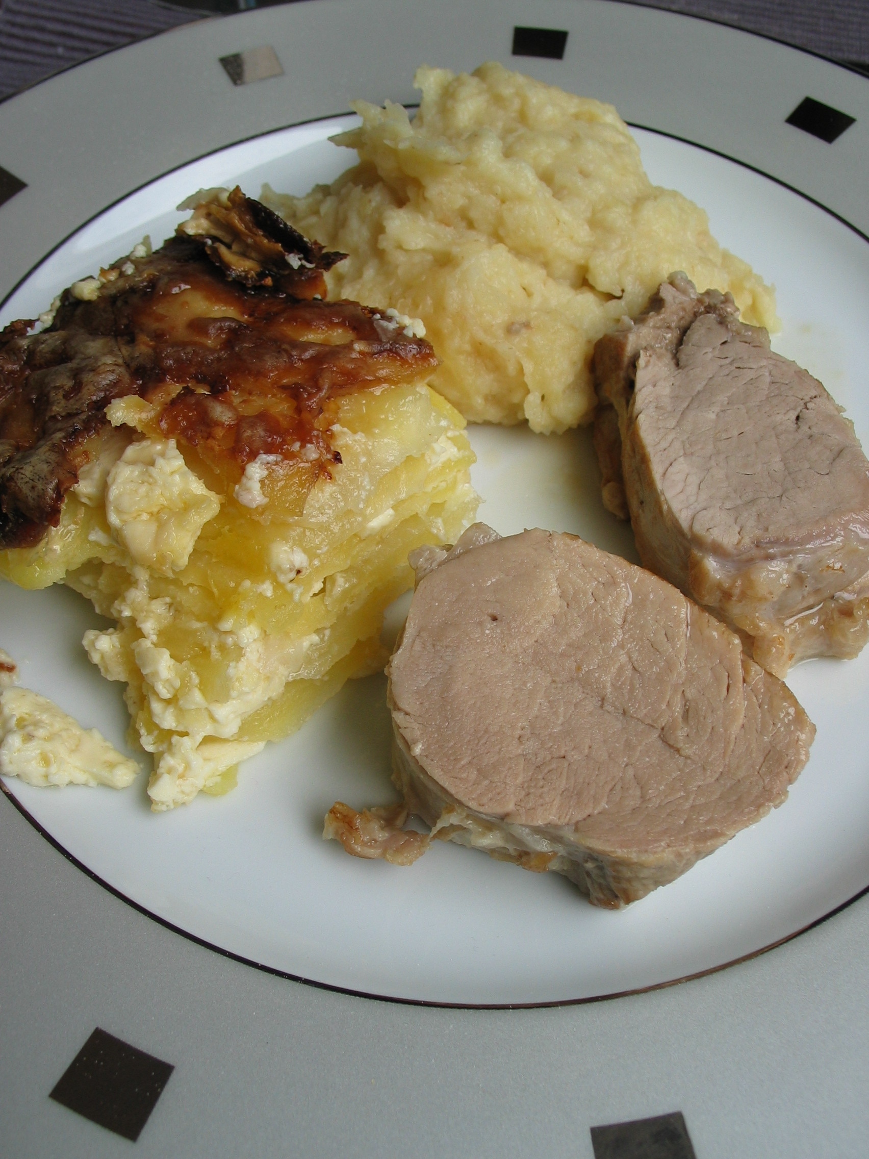 Deux morceaux de filet mignon accompagnés de gratin dauphinois et de purée de céleri.